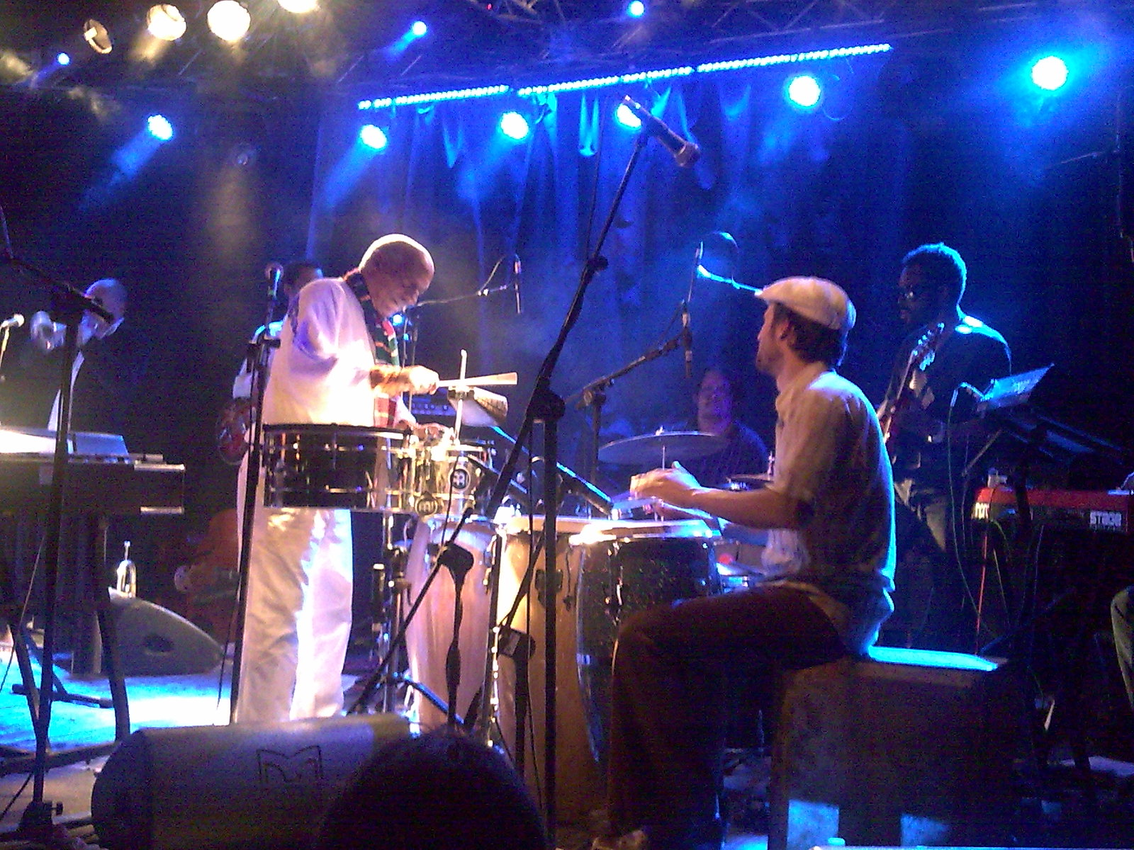 Mulatu Astatke en concert avec The Heliocentrics le 9 mars 2009 au Circolo degli Artisti à Rome